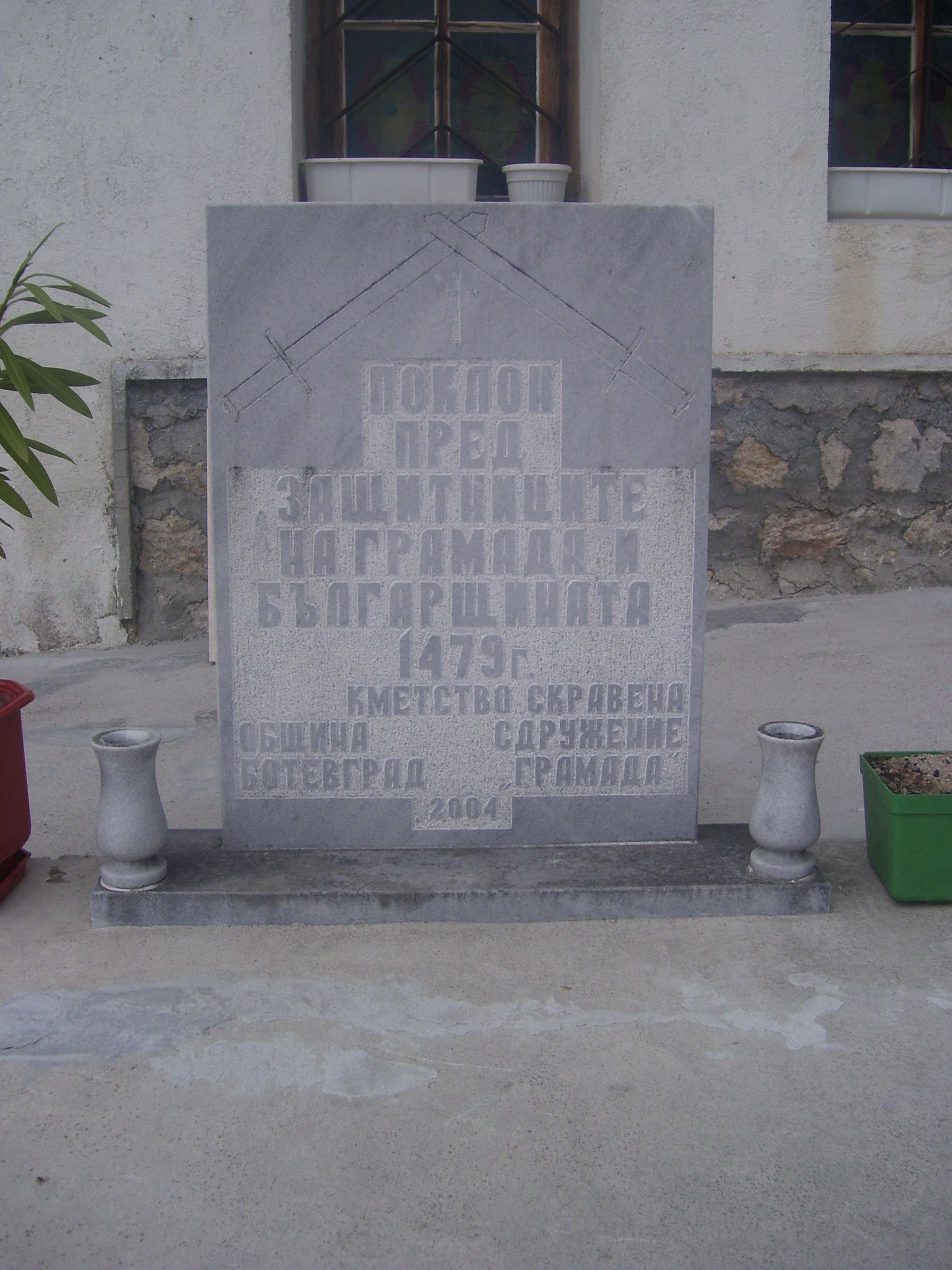 Църквата "Свети Николай" в Скравенския манастир